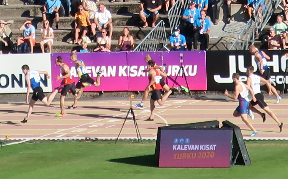 Miesten 200 metrin juoksijat saapumassa maaliin Kalevan kisoissa 2020. Maaliviivan ovat ylittäneet vasemmalta lukien Samuel Purola (3.), Roope Saarinen (2.) ja Samuli Samuelsson (voittaja). Keskellä punapaitainen juoksija on Tuukka Huuskola (5.) ja hänen takanaan Viljami Kaasalainen (4.). Muut juoksijat Konsta Alatupa (8.), Ilari Manninen (7.) ja Aleksi Lehto (6.).